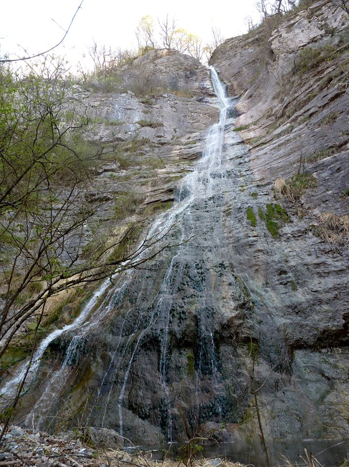 Accès par sentier.